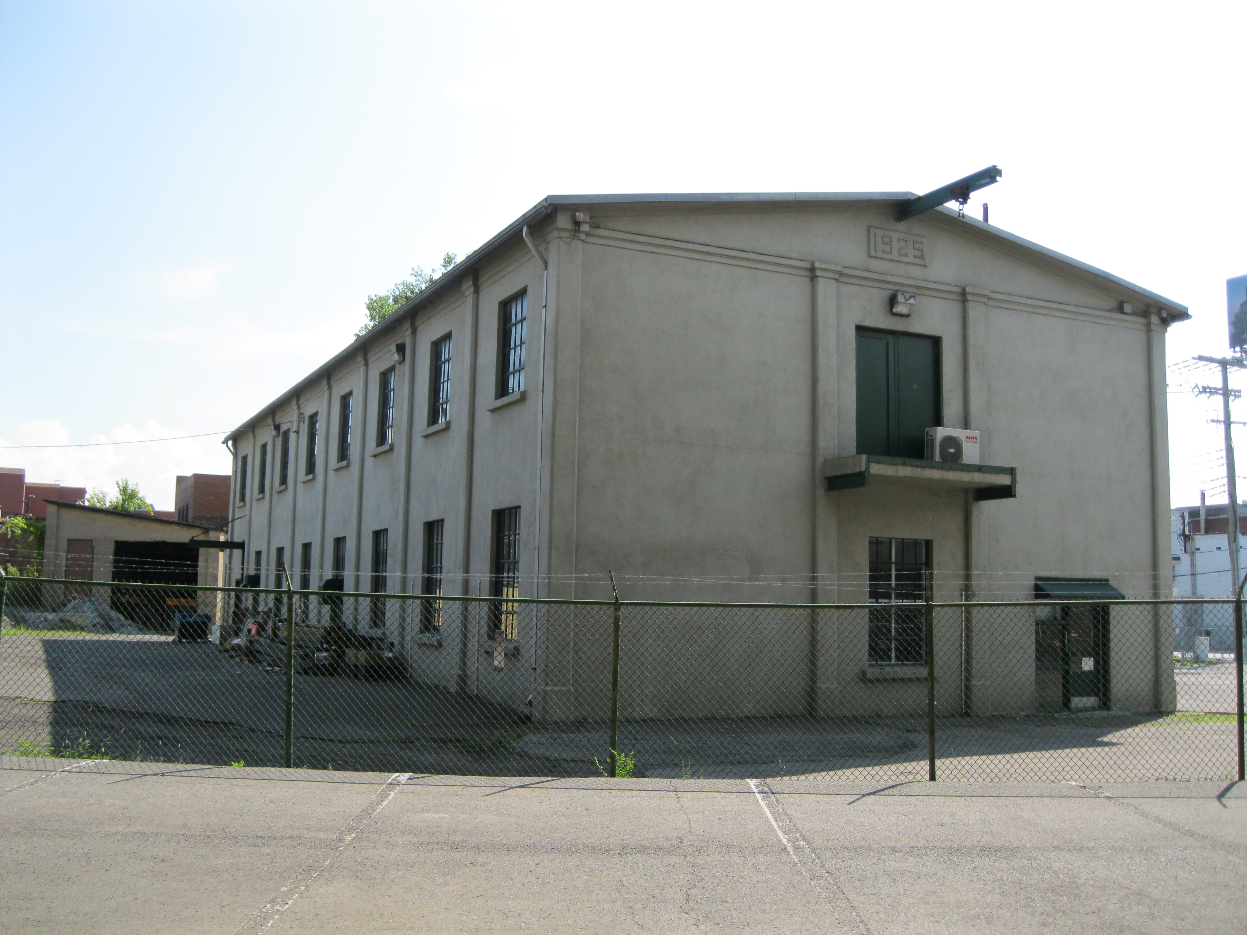 Rue Mill à Montréal : le bâtiment 1, entrepôt et bureau.